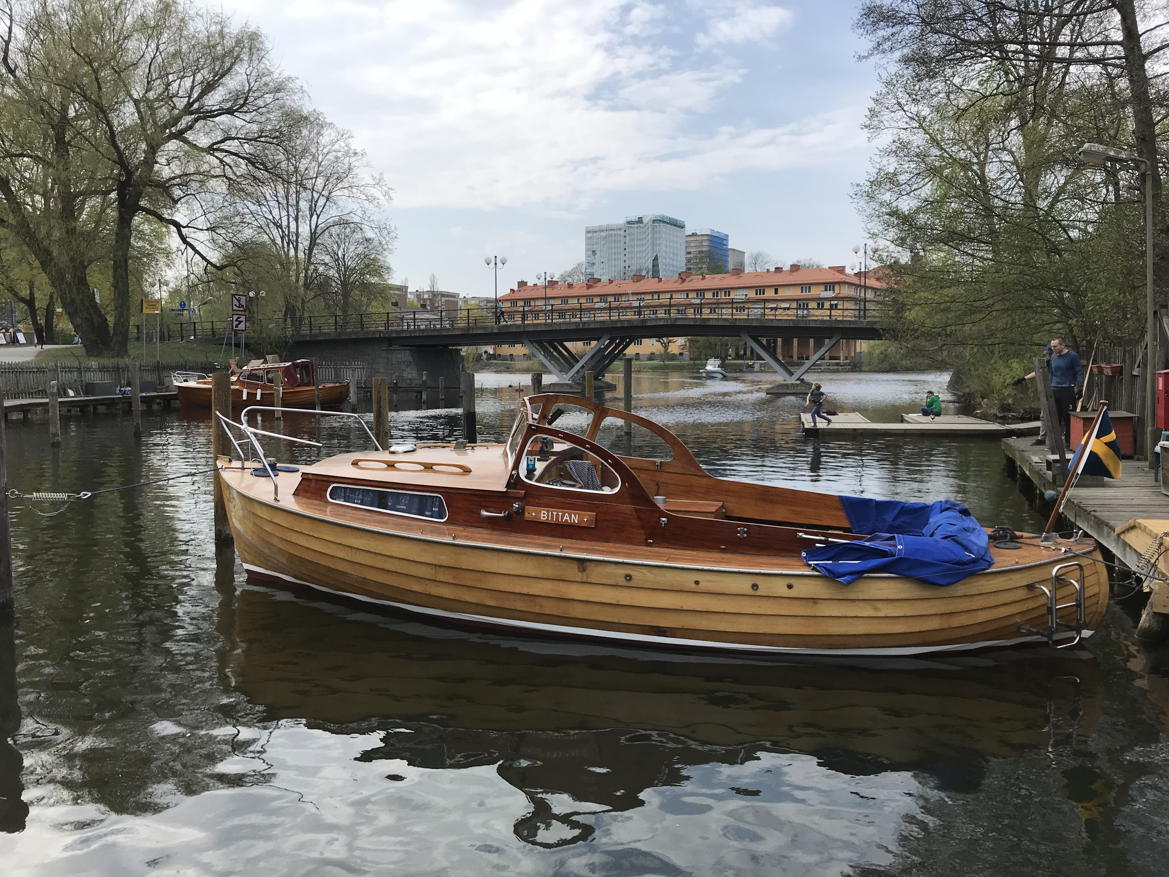 Bittan, orustsnipa från 1968 vid Heleneborgs båtklubb i Stockholm